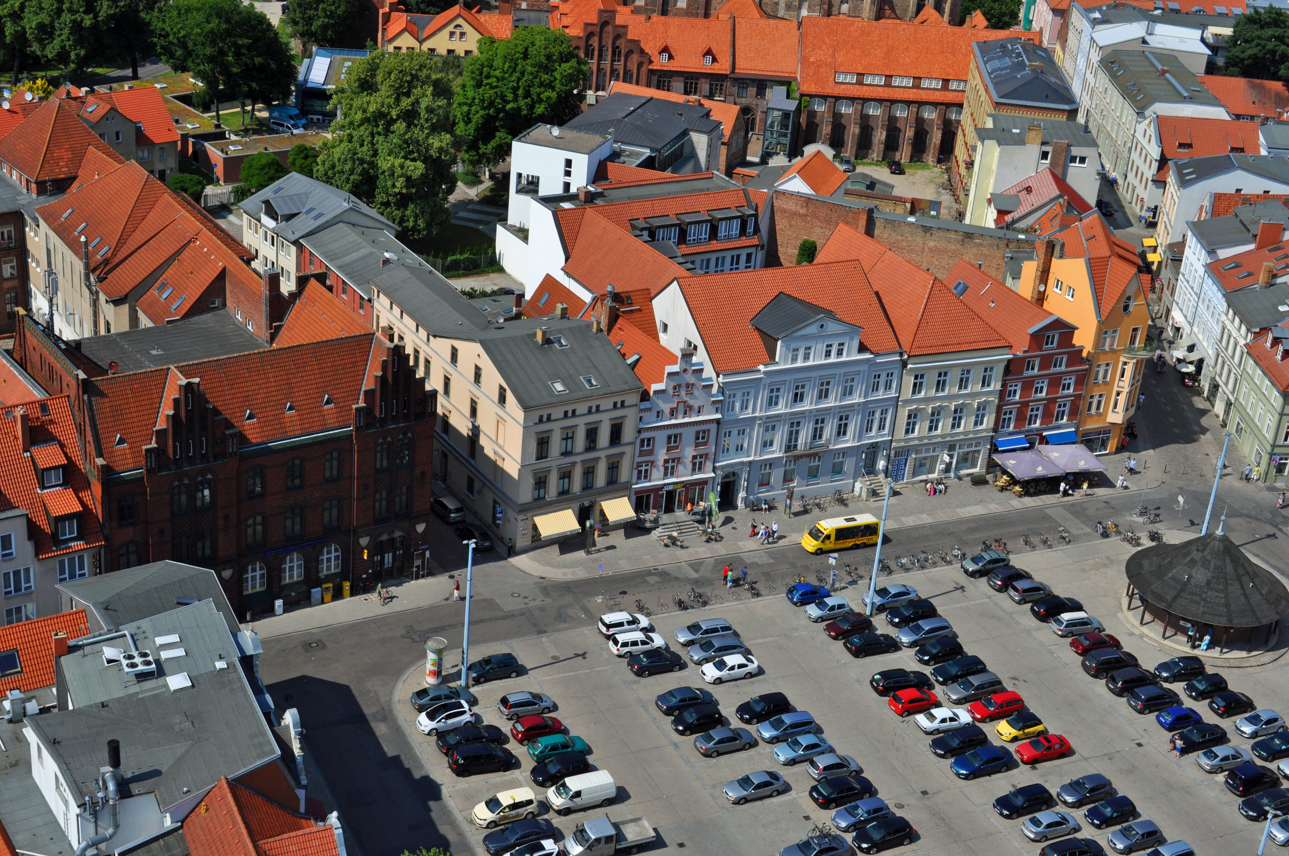 Fotografiert vom Turm der Marienkirche in Stralsund. Neuer Markt (Stralsund)